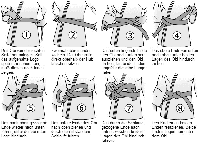 Obi-Knoten